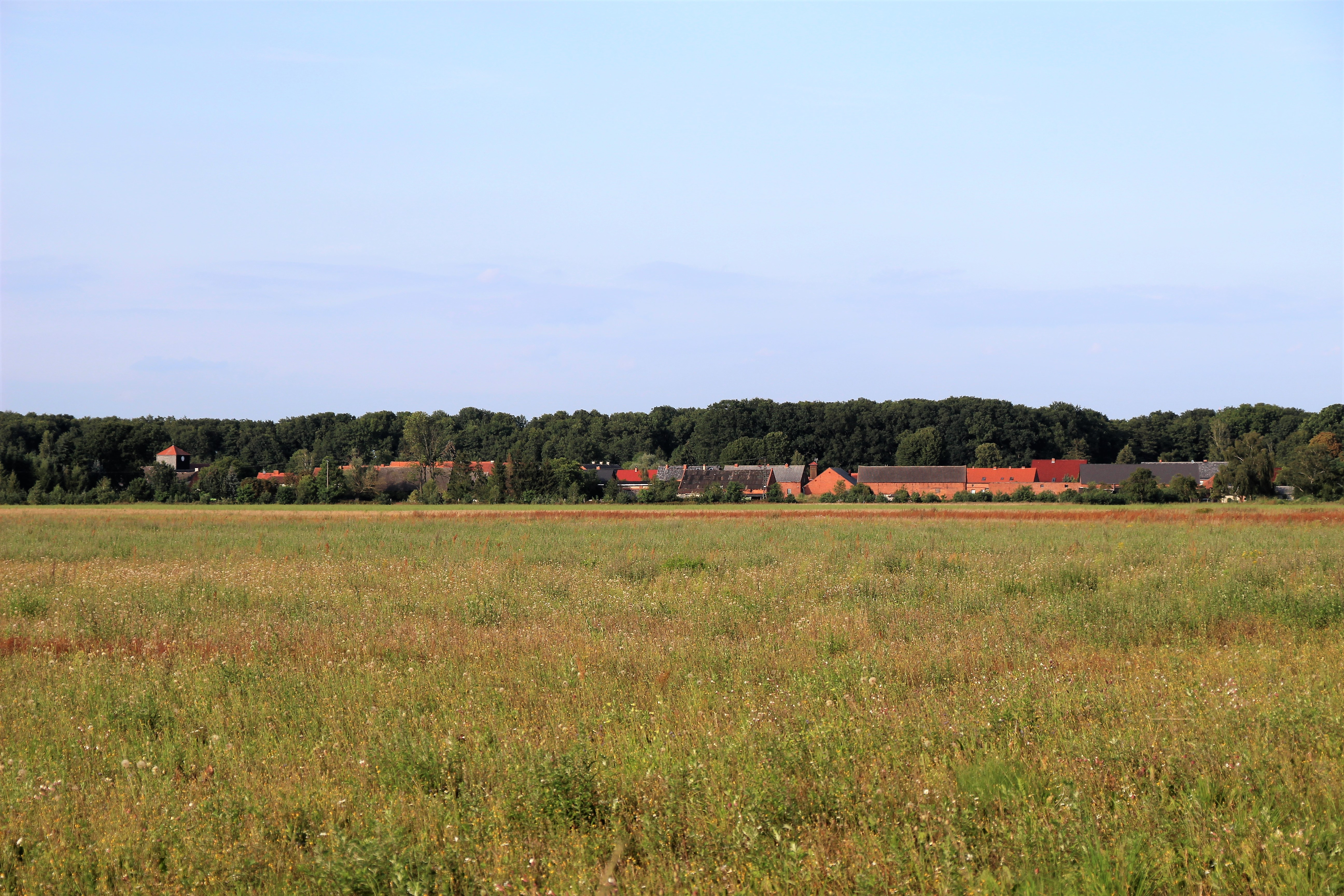 Ortsansicht von Südwesten